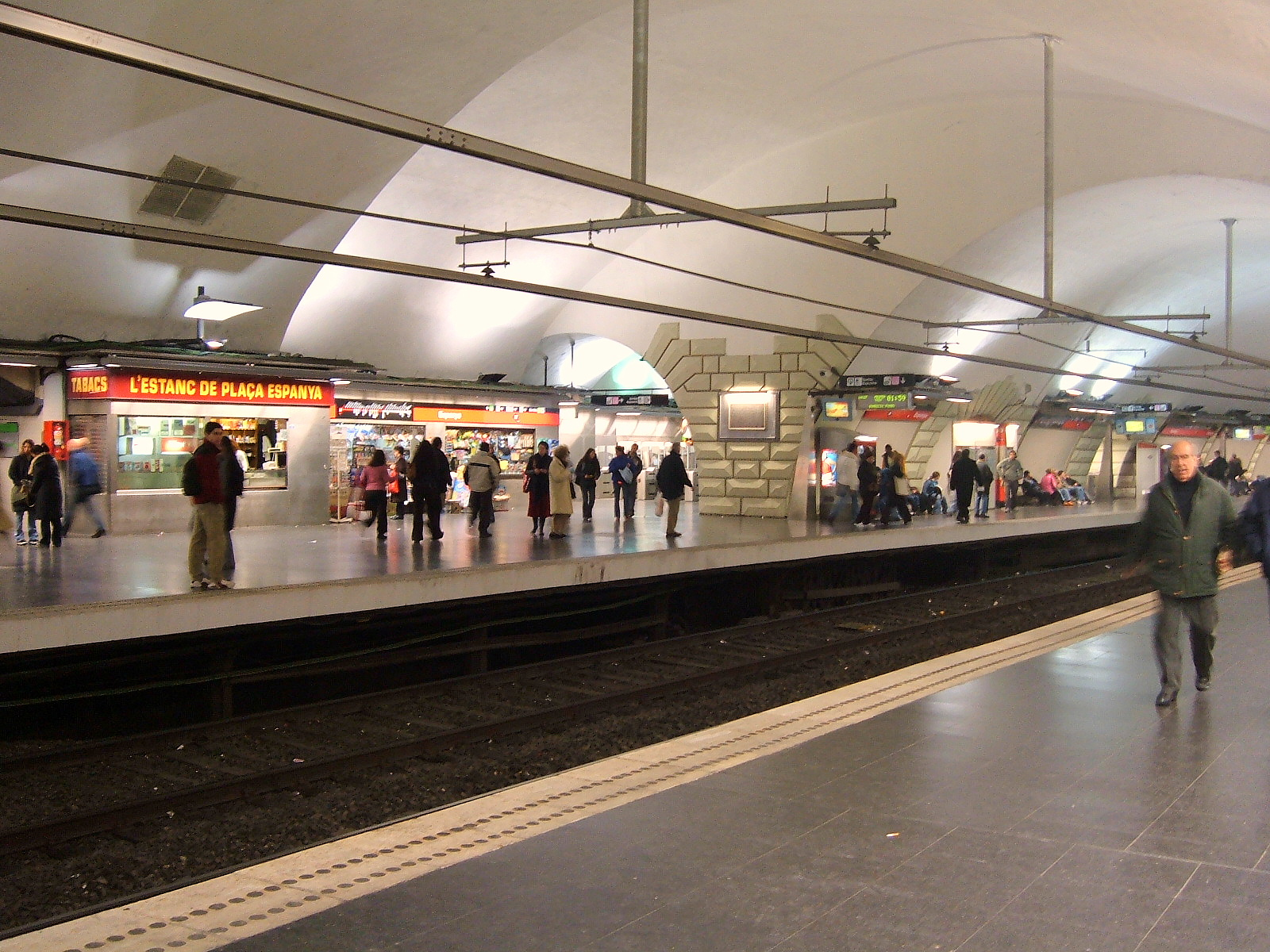 Barcelona, Estació de metro de plaça Espanya. Fotografia presa per mi mateix, Arturo Reina Sánchez, el 8 de Febrer del 2005. Aquesta fotografia té el permís de TMB per ser utilitzada per la Wikipedia.